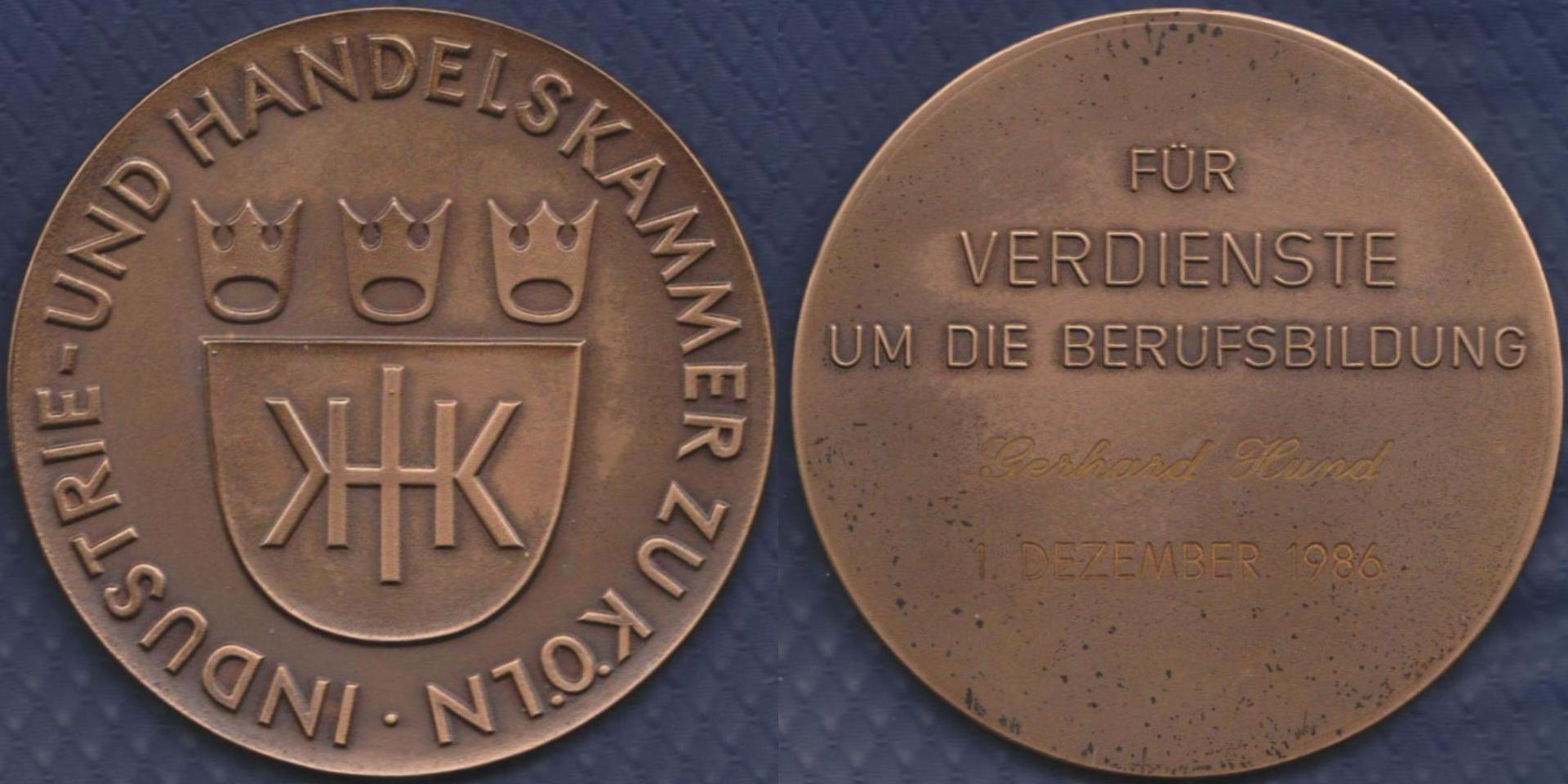 Medaille der Industrie- und Handelskammer zu Köln für Verdienste um die Berufsausbildung, verliehen am 1. Dezember 1986 an Gerhard Hund.